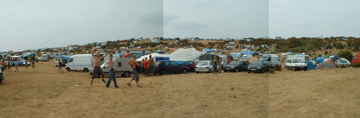 Panoramique du festival du Larzac en 2003 (France). La photo à été prise le dimanche en fin de matinée au milieu du Teknival.